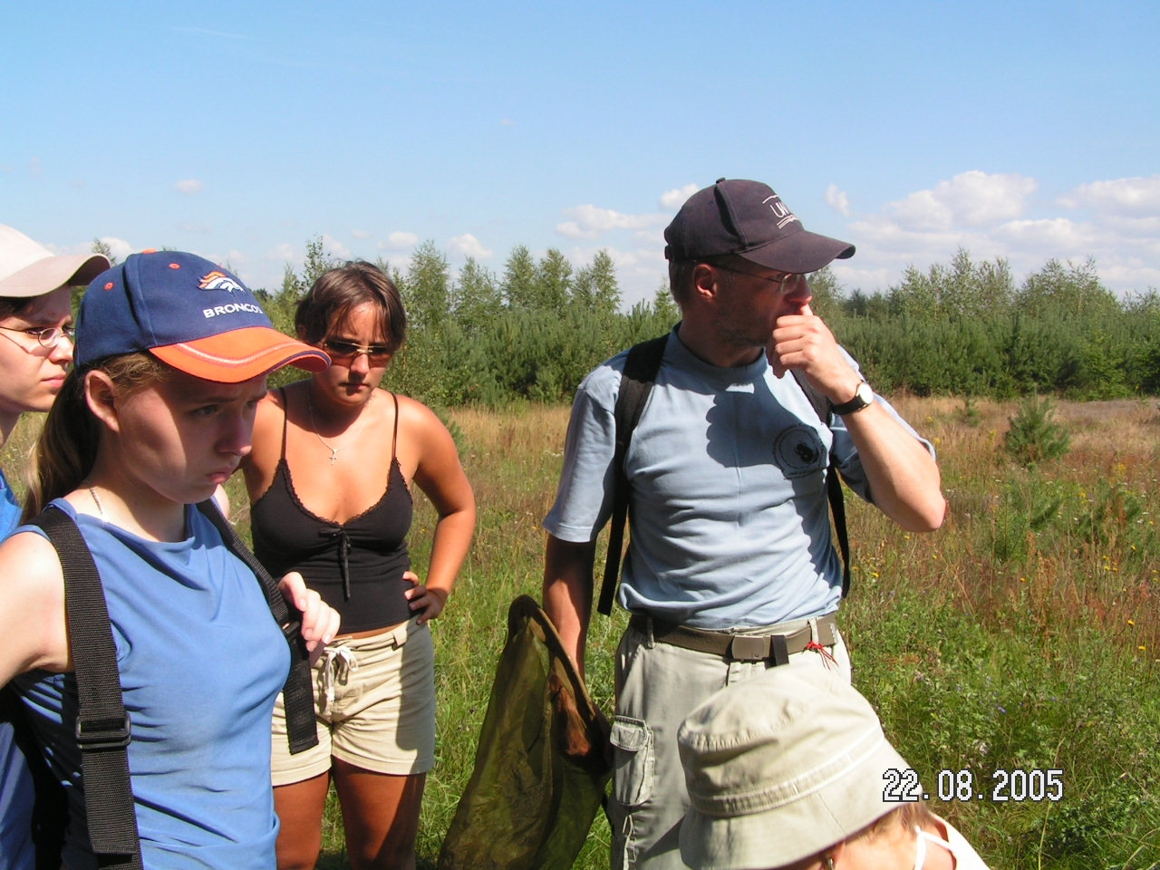 Studencko-Doktoranckie Koło Naukowe Ekologów, S.Czachorowski, obóz naukowy w Ełku, rok 2005